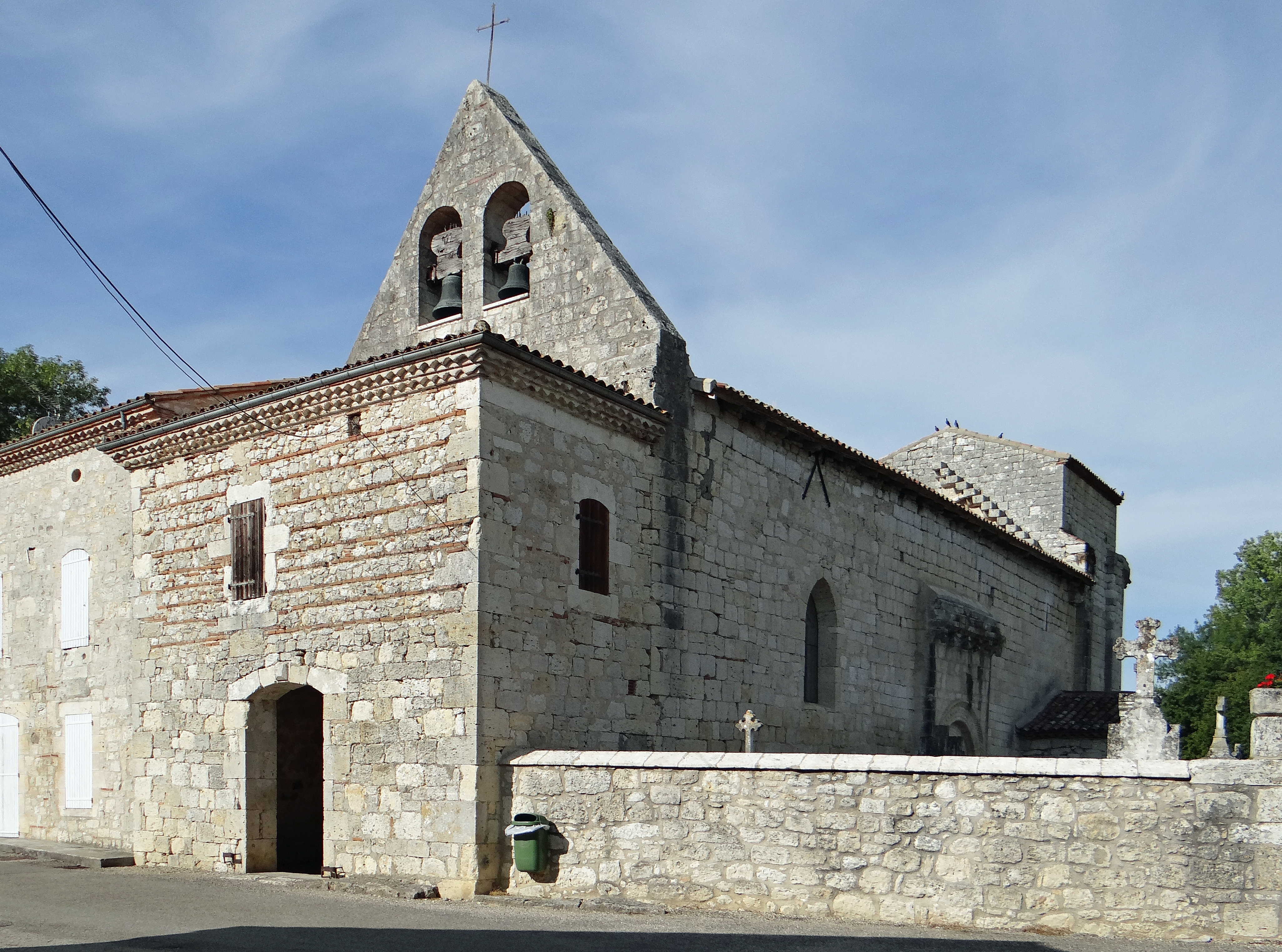 Saint-Caprais-de-Lerm - Église Saint-Caprais - Enesemble vu de l'ouest